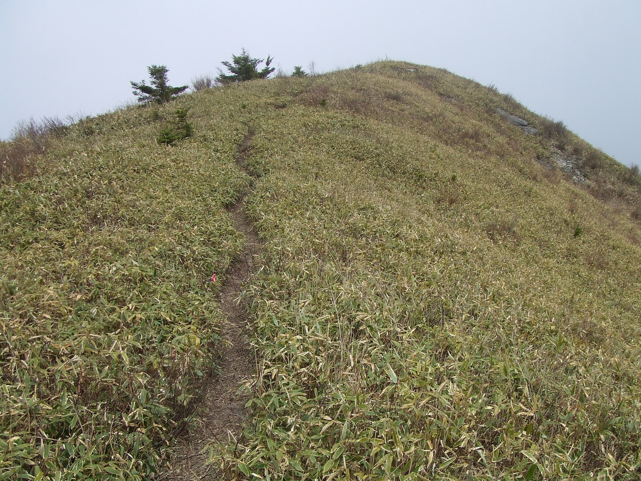 寒峰の頂上へのアプローチ